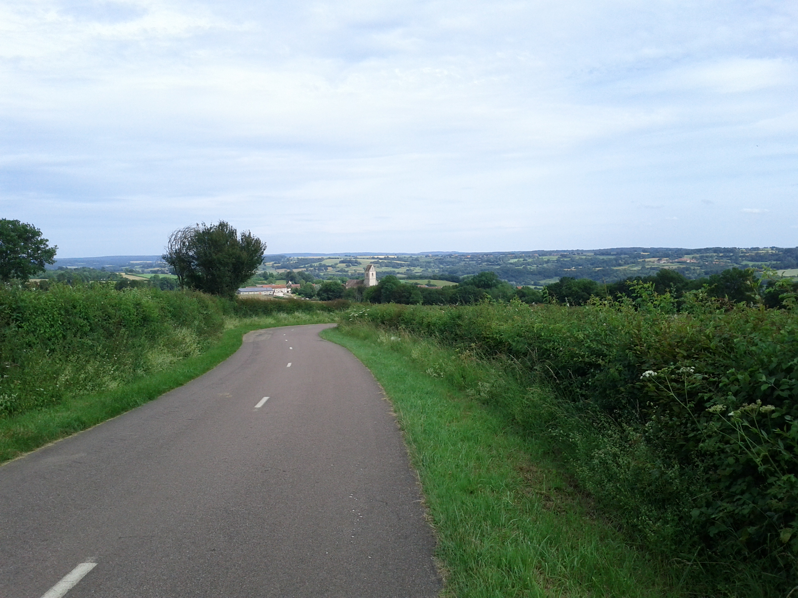 21230 Viévy, France